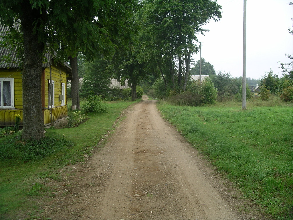 Gipėnų kaimas